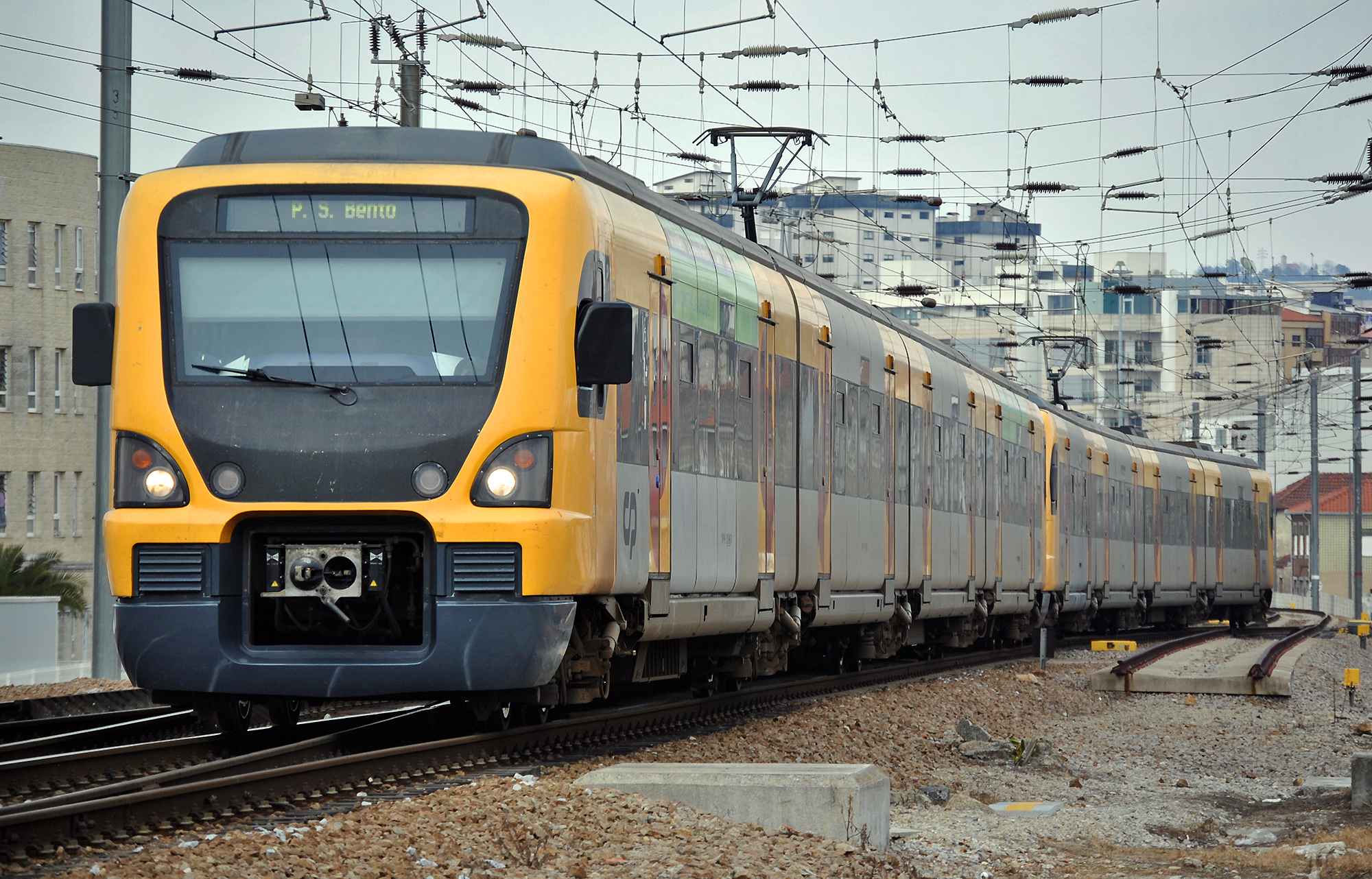 Dupla de 3400, SUBURB